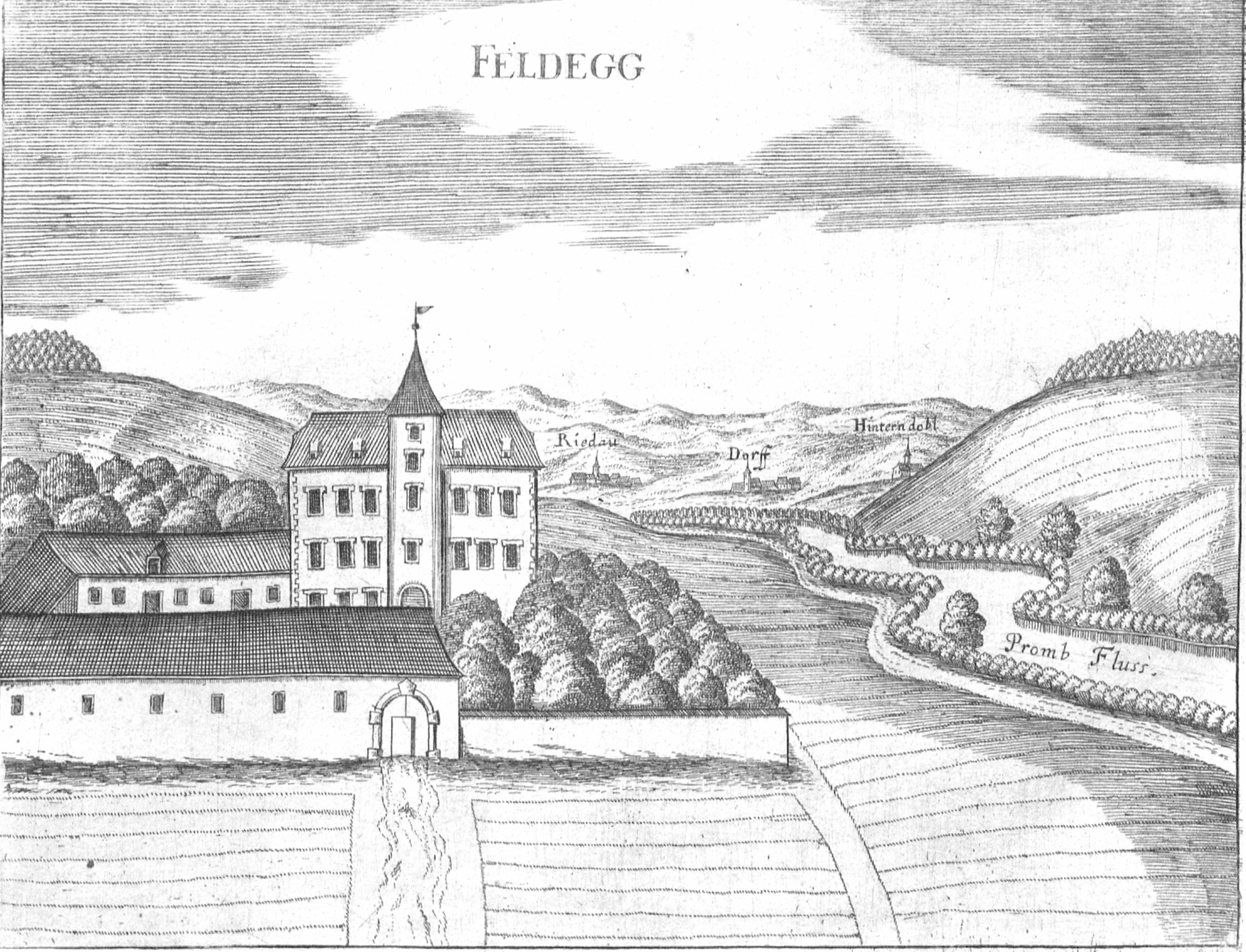 Schloss_Feldegg_-_1664